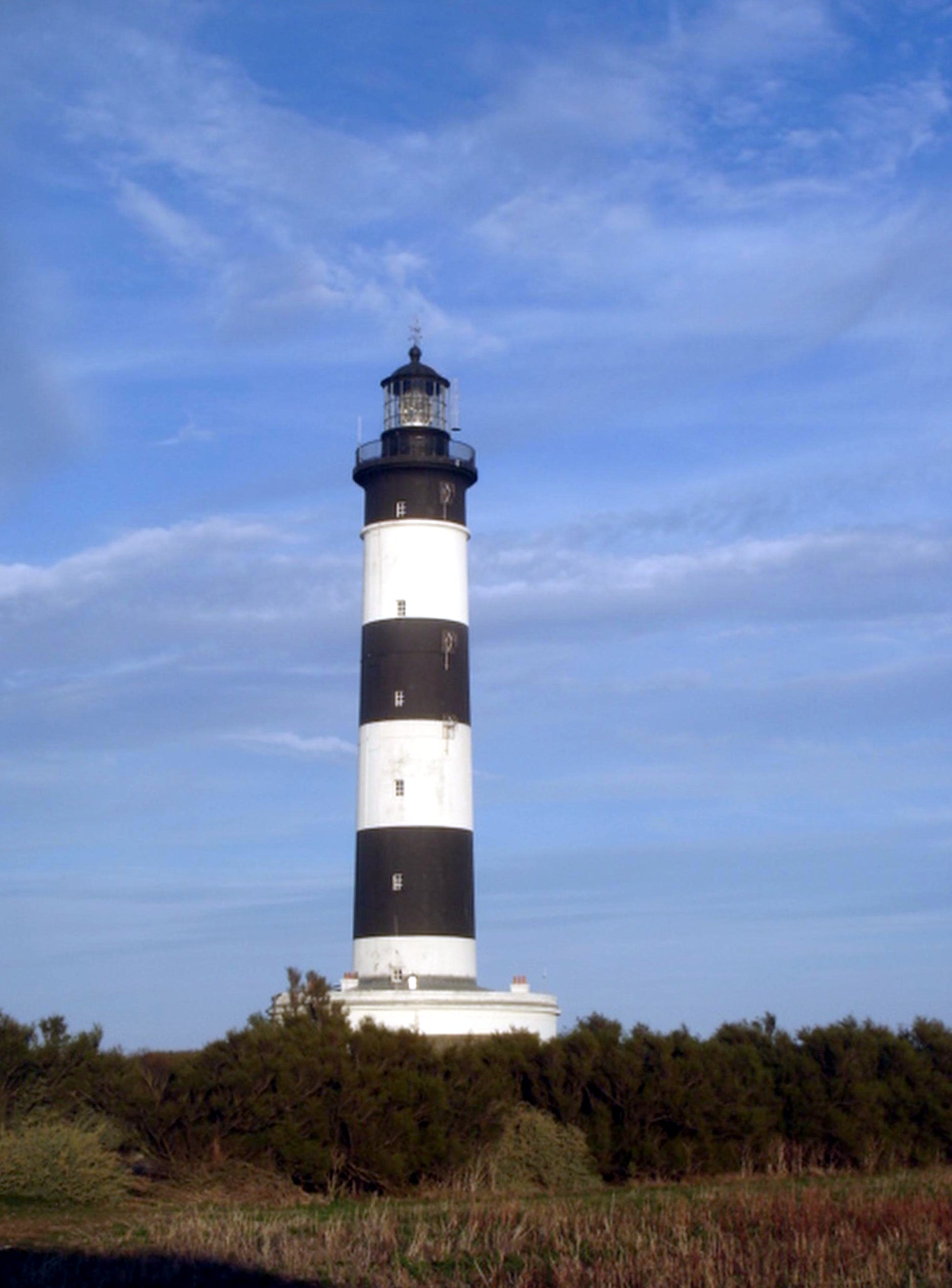 (Phare de Chassiron près de Saint Denis d'Oléron sur l'île d'Oléron - France) Auteur : Jean-Claude Perez